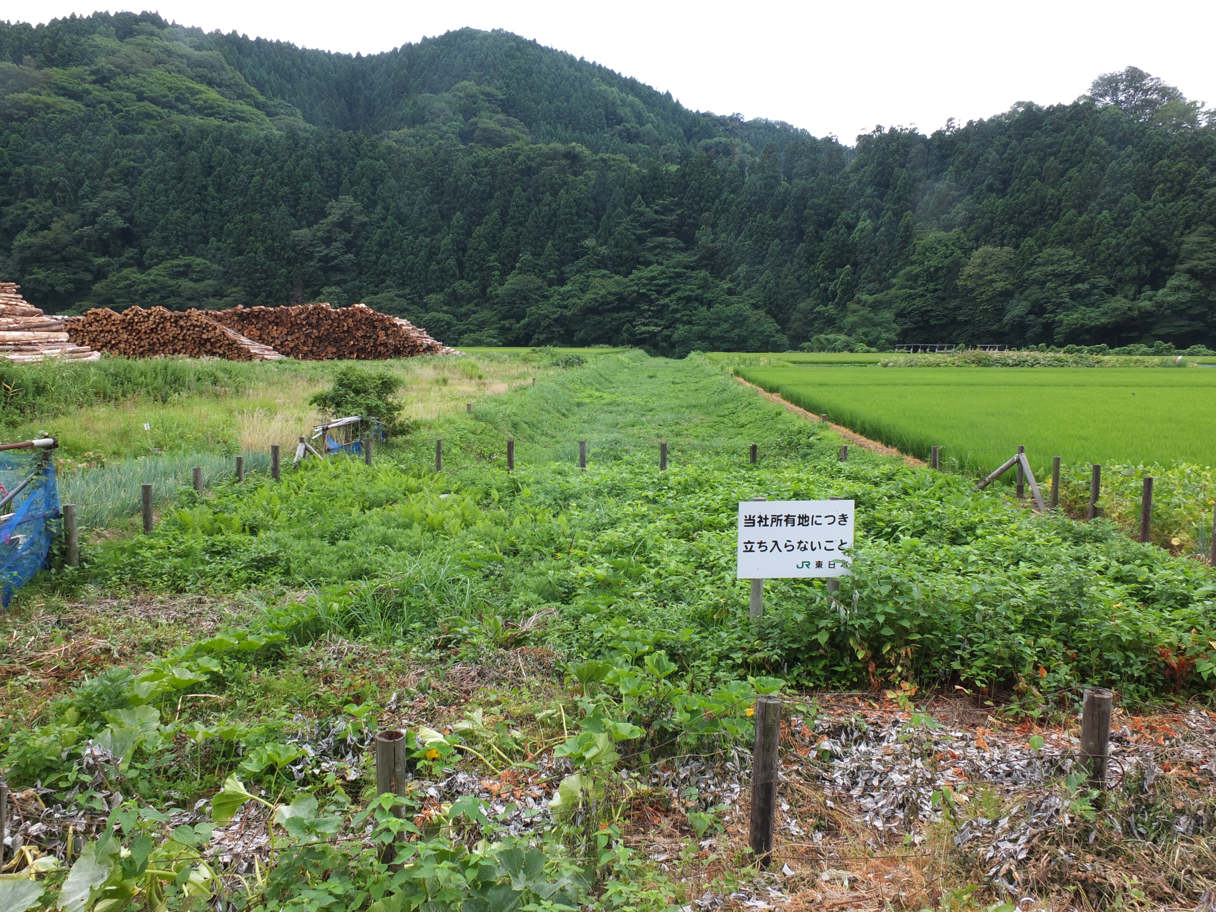 羽越本線 小岩川駅-あつみ温泉駅間（住吉山トンネル-宮名トンネル間）に確保されている新線線路用地